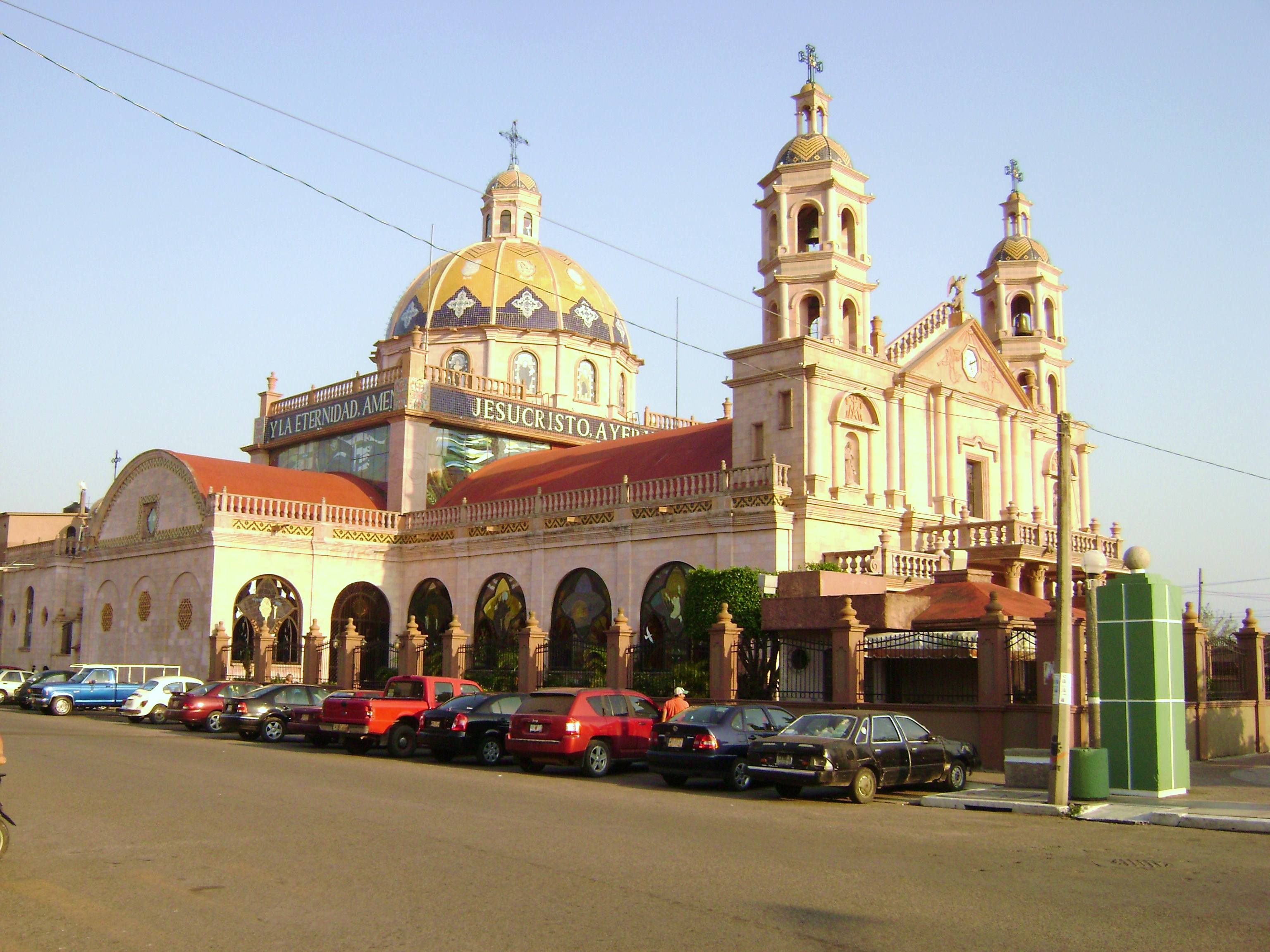 única en el estado de Tabasco.